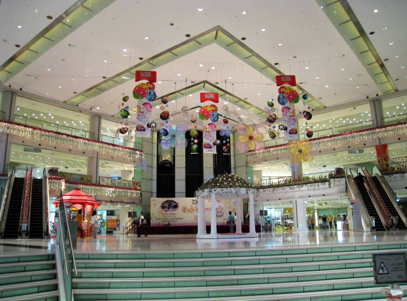 Fortune Metropolis Entrance Atrium